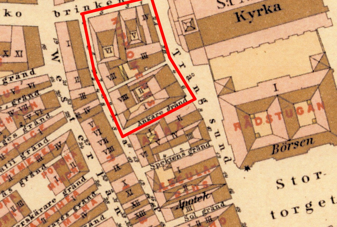 Del av Alfred Rudolf Lundgrens Stockholmskarta visande Kvarteret Hippomenes